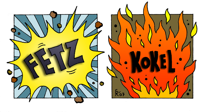 Onomatopöie in Comics